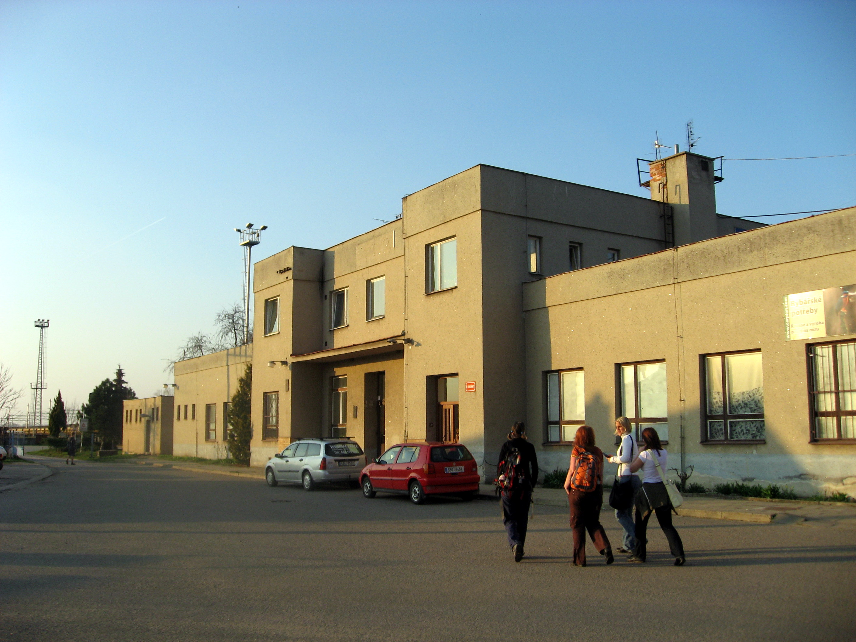 Podivín, nádraží